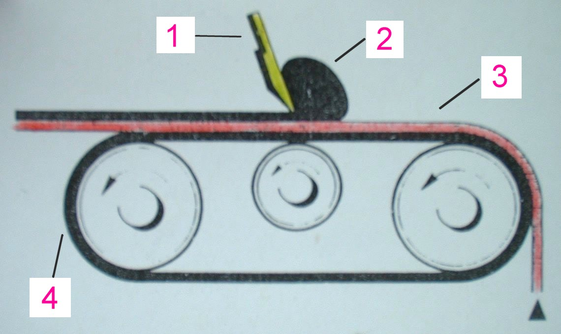 Schema: Beschichtung mit Gummituch Česky: Schema nanosovani s textilii na pryzovem pasu